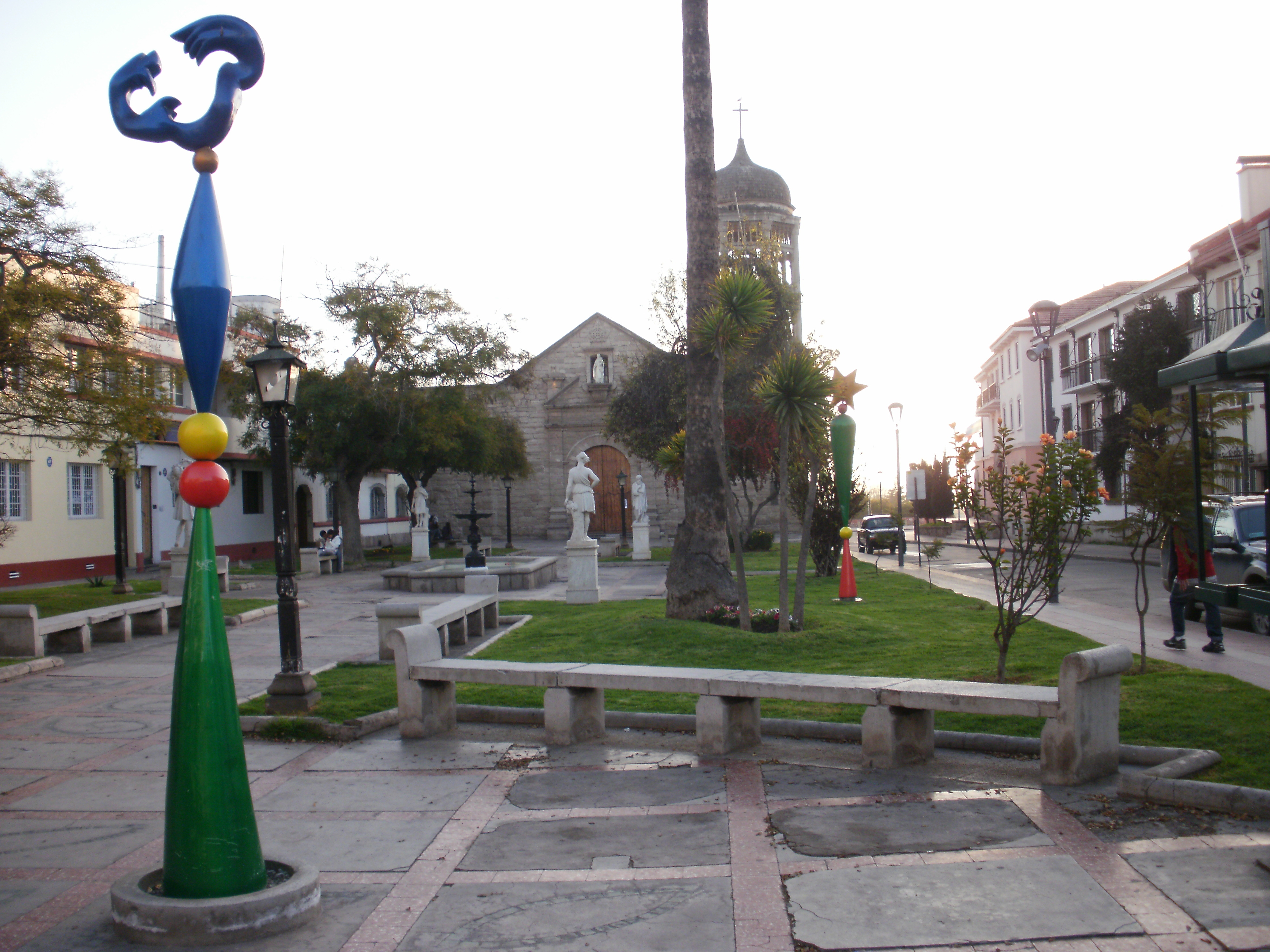 Al fondo Iglesia Santo Domingo This is a photo of a national monument in Chile: 447